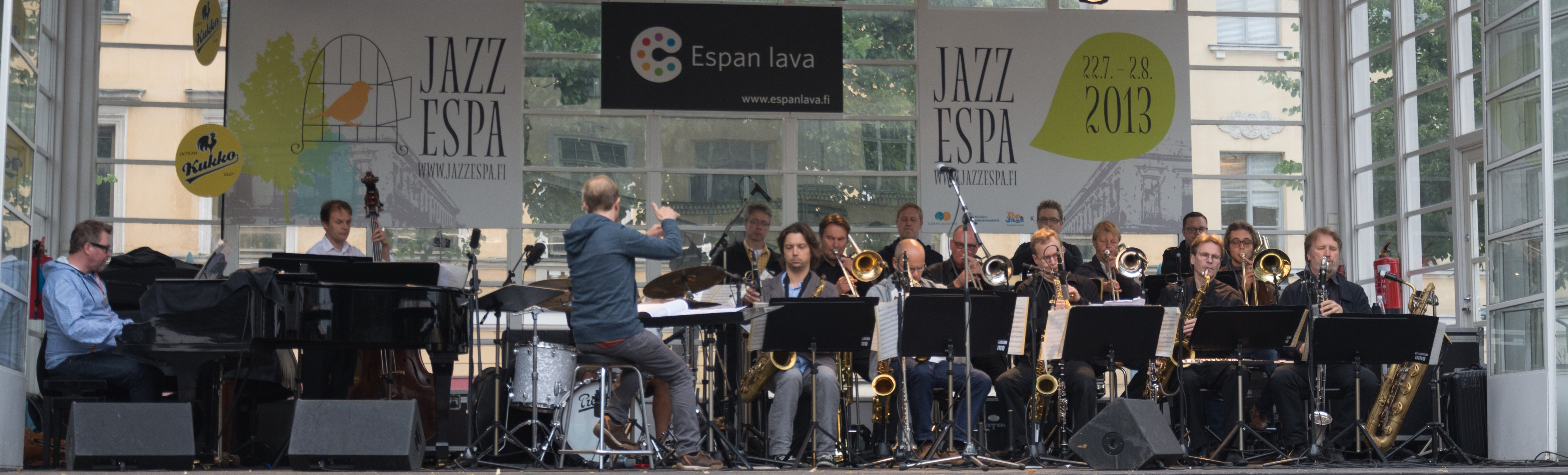 Umo-yhtye